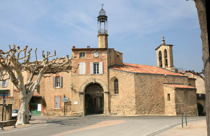 Village of Modène in Vaucluse, France